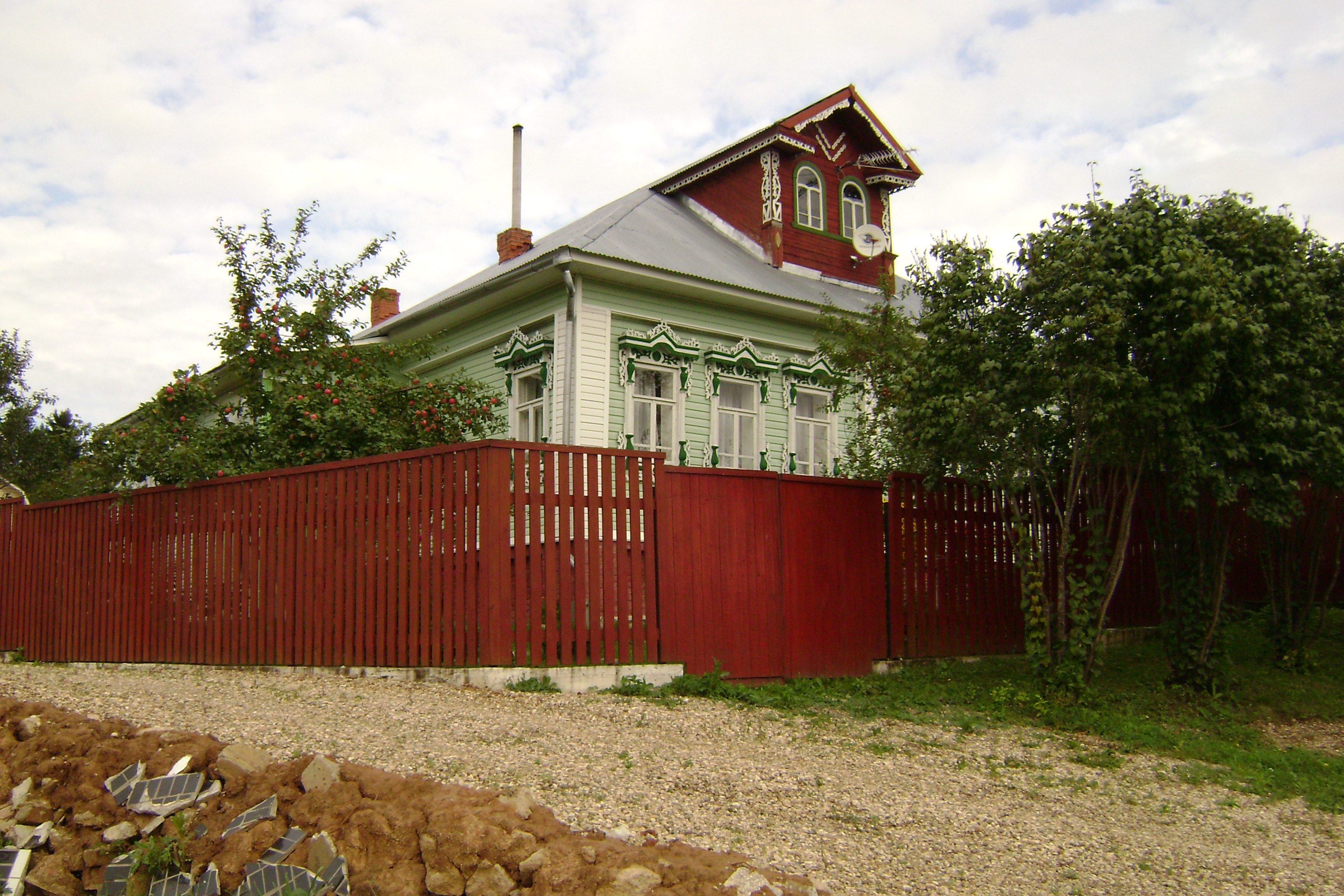 Жилой дом в деревне Денисово